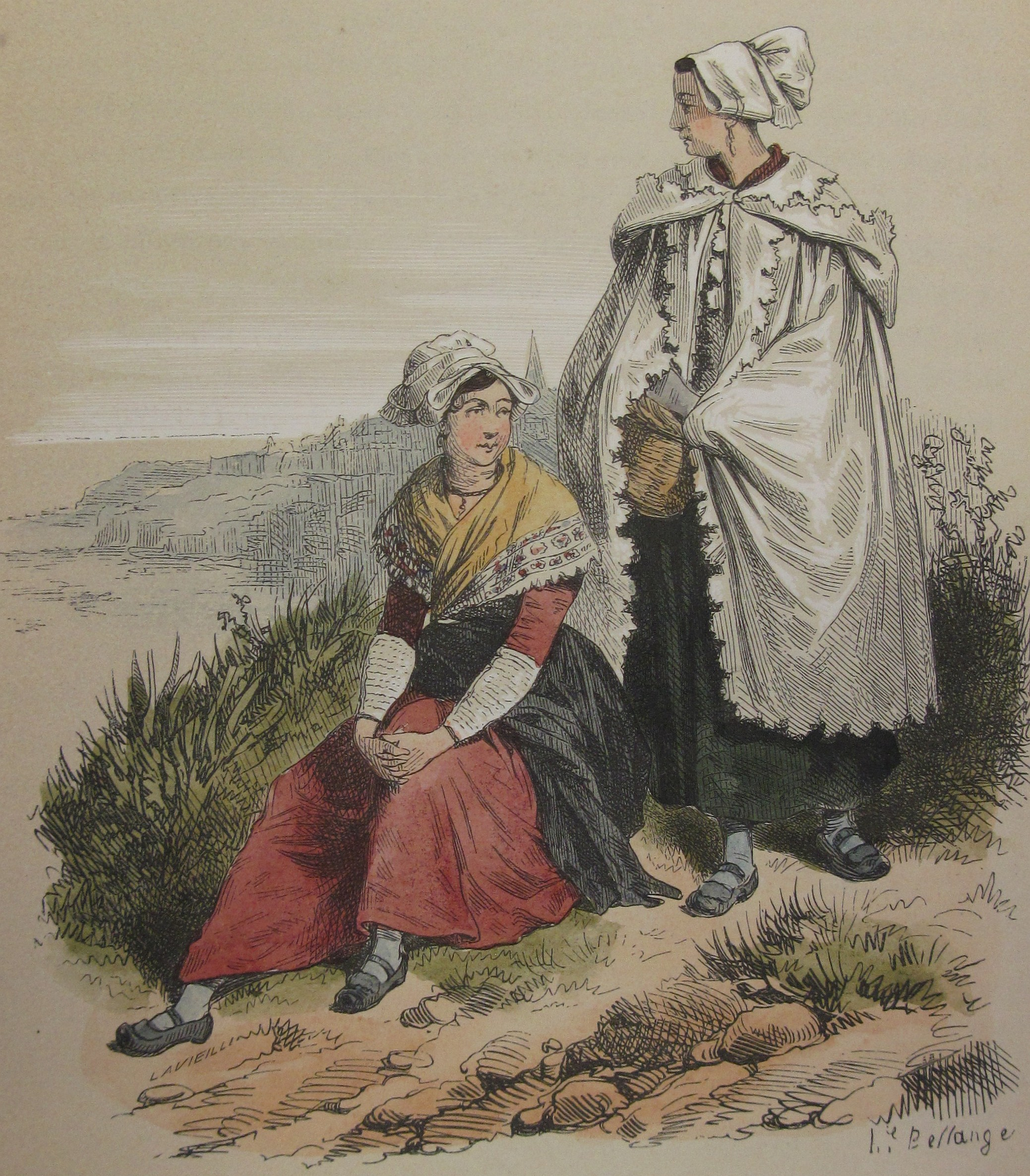 La Normandie par M. Jules Janin, illustrée par MM Morel-Fatio, Tellier, Gigoux, Daubigny, Debon, H. Bellangé, Alfred Johannot. Paris, Ernest Bourdin, éditeur, Rue de Seine, 51.] This is a faithful photographic reproduction of a two-dimensional, public domain work of art. The work of art itself is in the public domain for the following reason: This work is in the public domain in its country of origin and other countries and areas where the copyright term is the author's life plus 100 years or less. This work is in the public domain in the United States because it was published (or registered with the U.S. Copyright Office) before January 1, 1924. This file has been identified as being free of known restrictions under copyright law, including all related and neighboring rights. The official position taken by the Wikimedia Foundation is that "faithful reproductions of two-dimensional public domain works of art are public domain".This photographic reproduction is therefore also considered to be in the public domain in the United States. In other jurisdictions, re-use of this content may be restricted; see Reuse of PD-Art photographs for details.